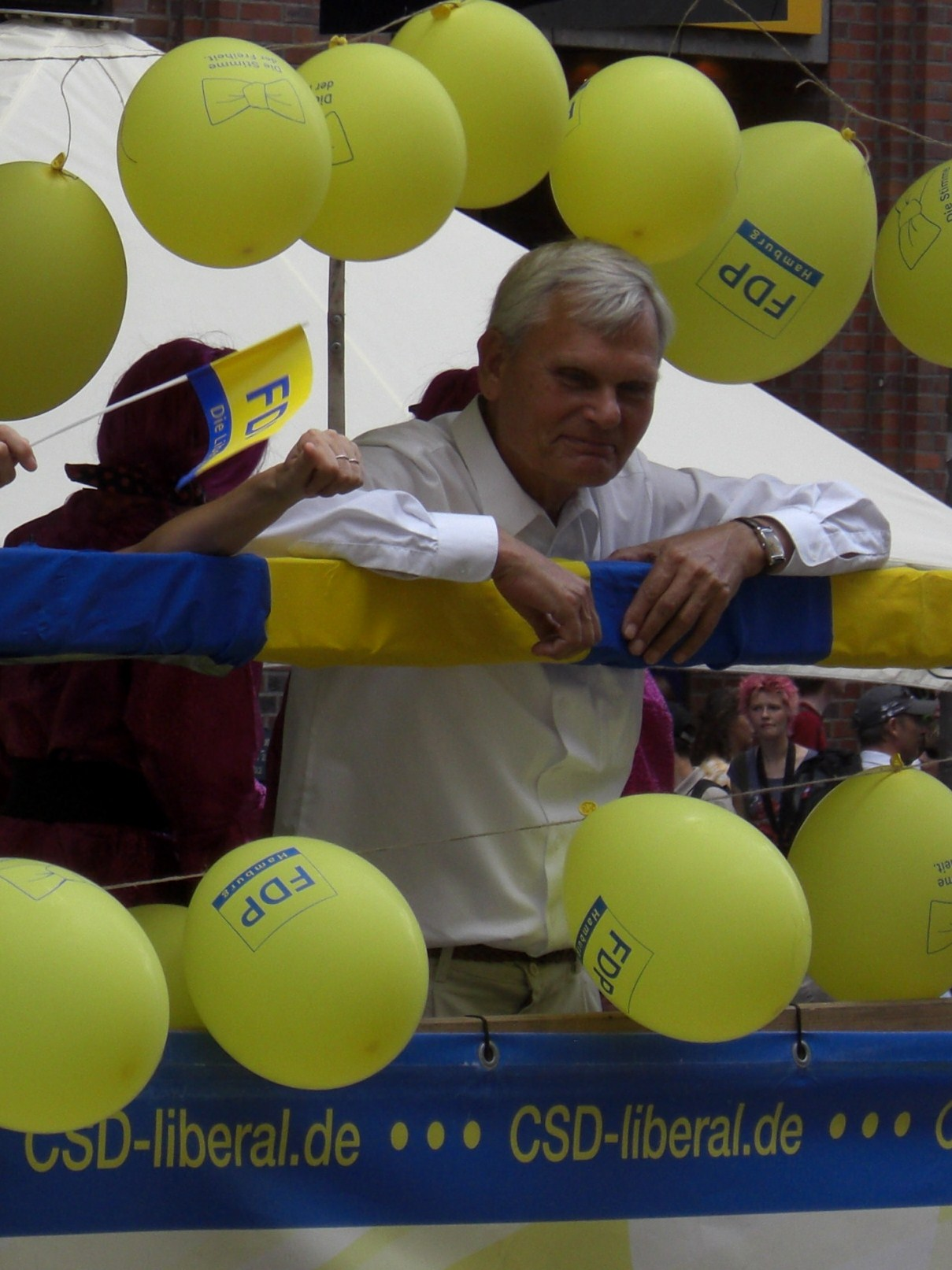 Hinnerk Fock beim CSD-Hamburg 2008 auf der Mönckebergstraße, Wagen der FDP